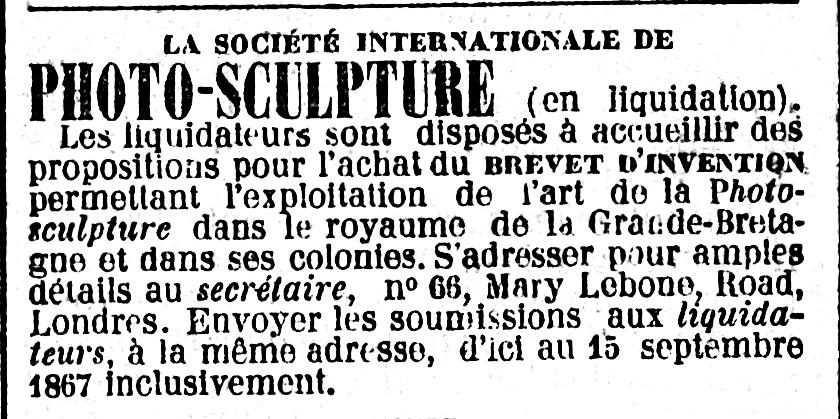 Annonce pour la Société internationale de Photo-sculpture basée à Londres et en liquidation (cession du brevet pour l'empire britannique).